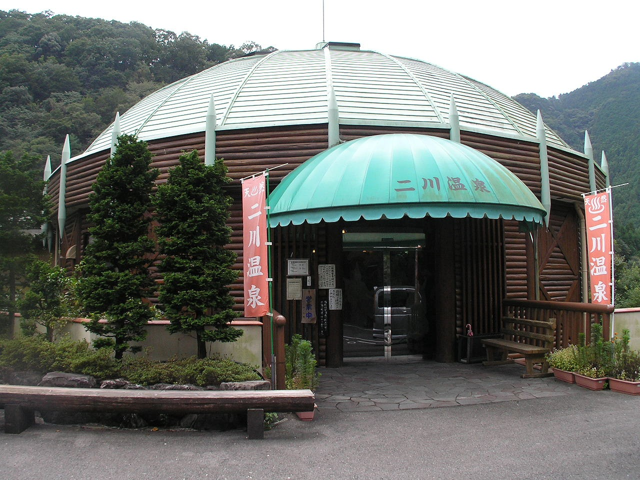 二川温泉建物